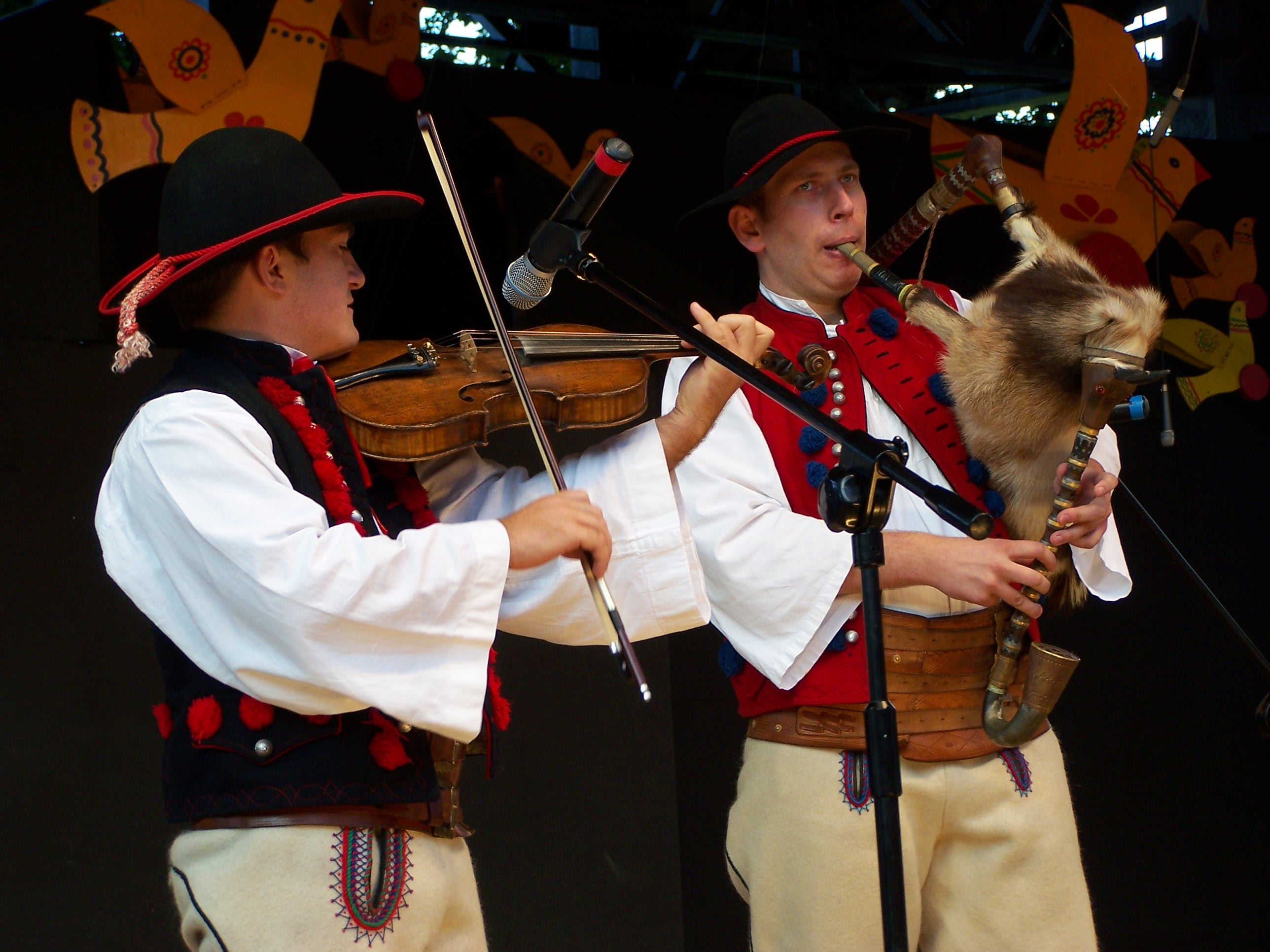 Występ kapeli Fickowa Pokusa z Jeleśni podczas 43. Tygodnia Kultury Beskidzkiej w Żywcu.